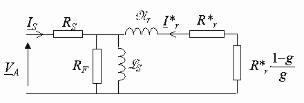 dessin perso